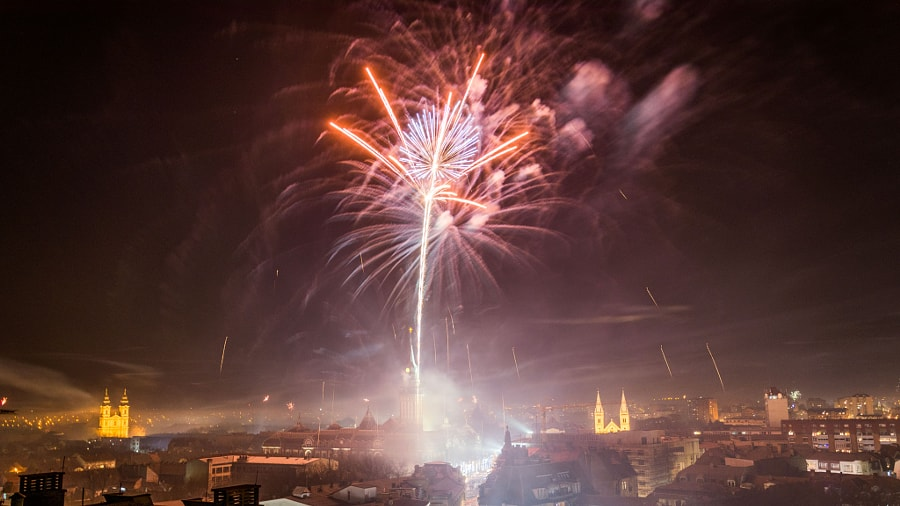 Фейерверк в Суботице, 1 января 2017 года